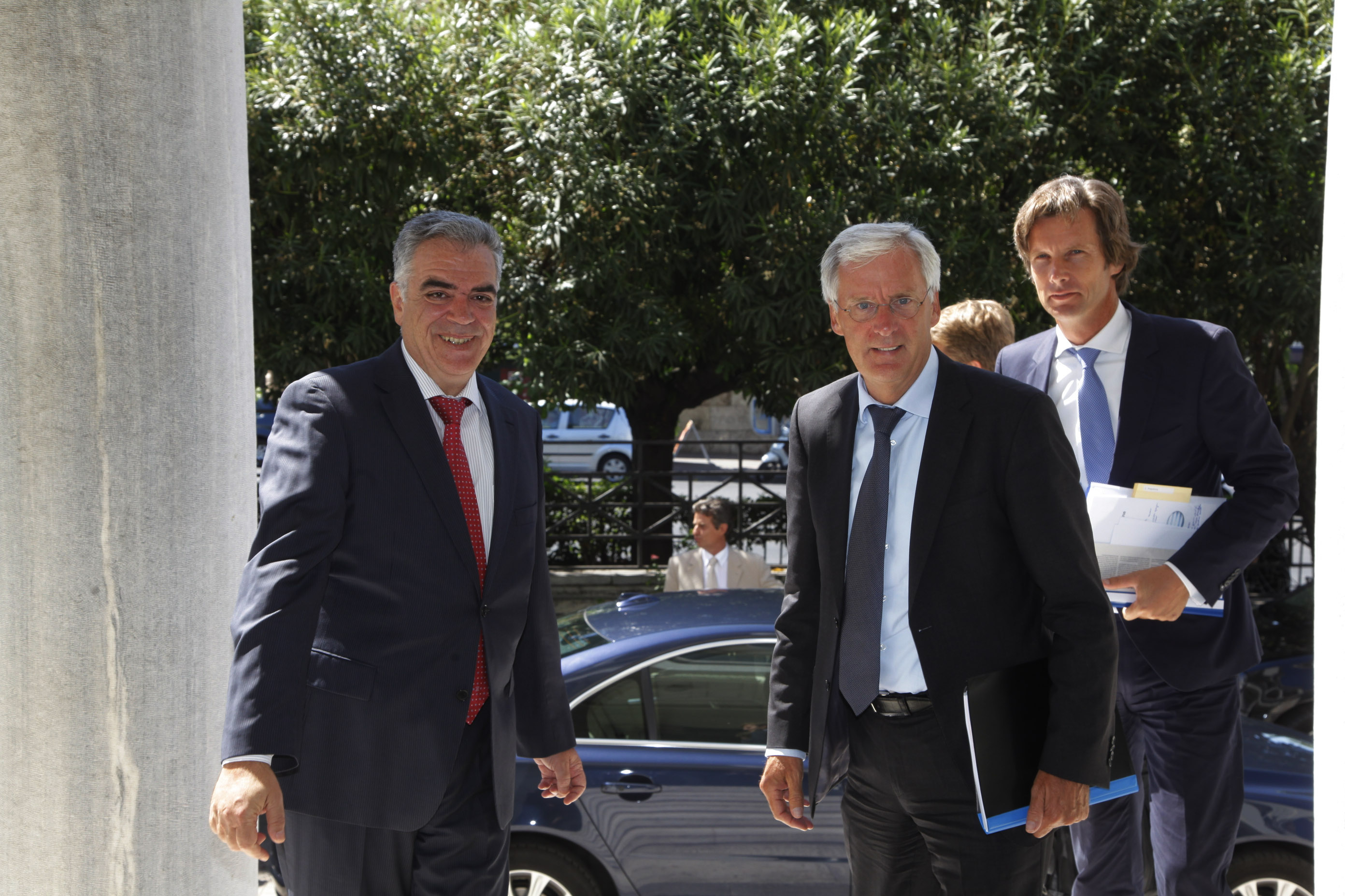 Την Τετάρτη 29 Αυγούστου 2012, ο Υφυπουργός Εξωτερικών Δημήτρης Κούρκουλας συναντήθηκε με τον Ολλανδό ομόλογό του Υπουργό Ευρωπαϊκών Υποθέσεων, Ben Knapen στο Υπουργείο Εξωτερικών.